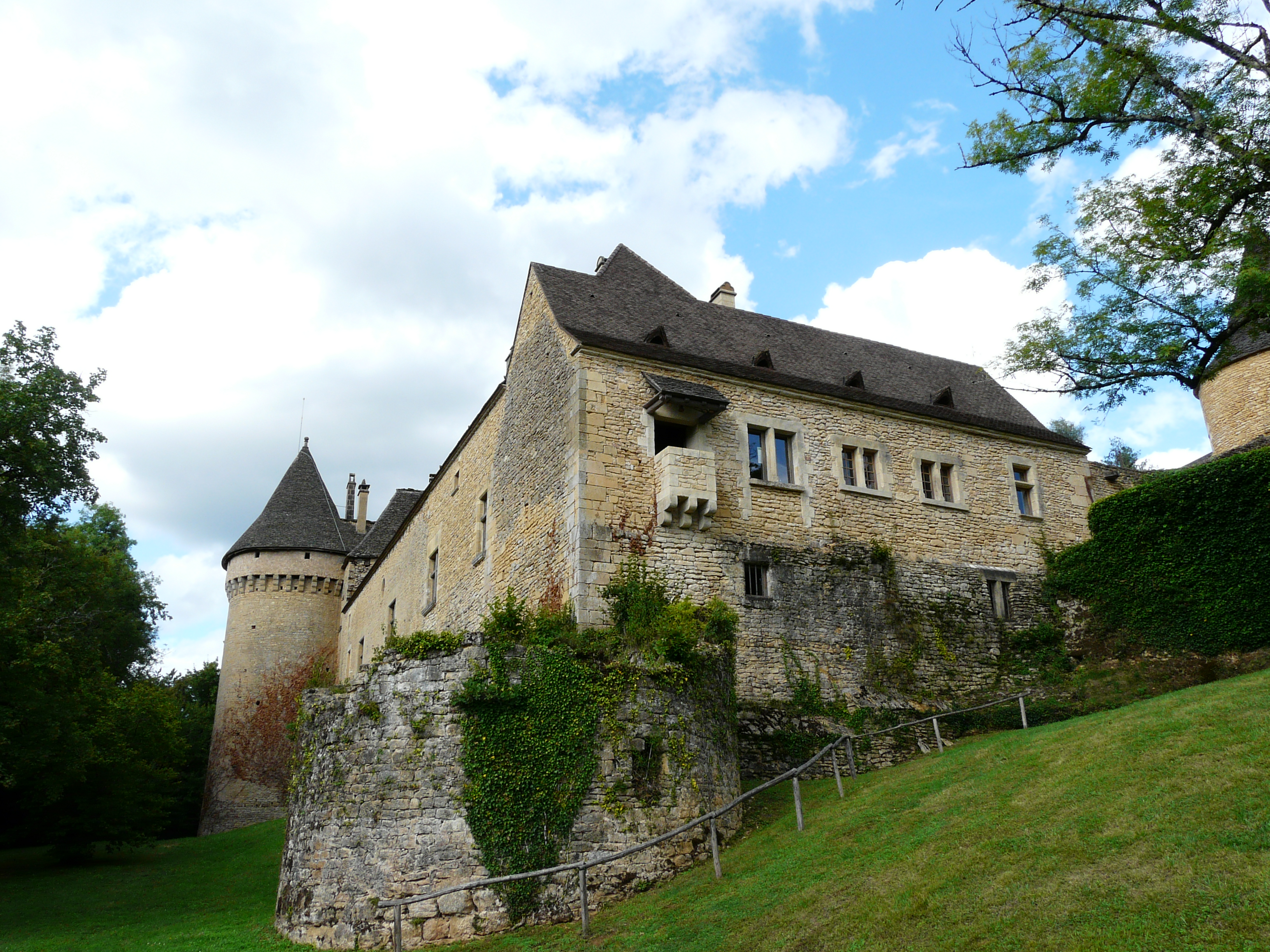 L'angle ouest du château de Coulonges, Montignac, Dordogne, France. .